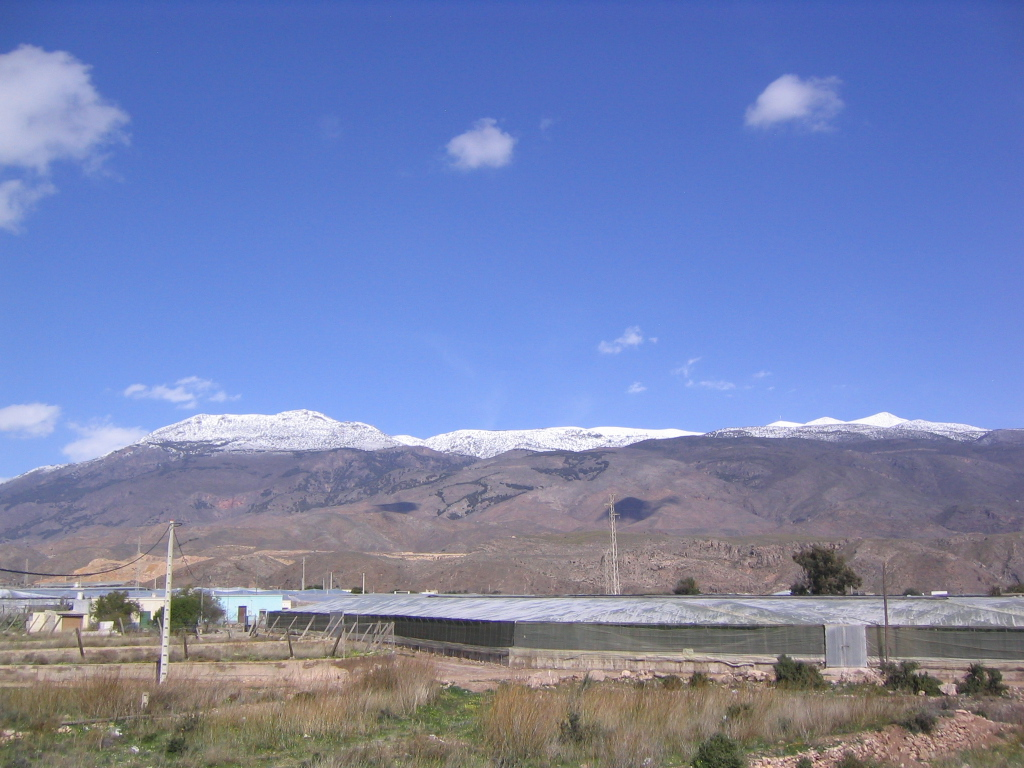 Sierra de Gádor, cara sur